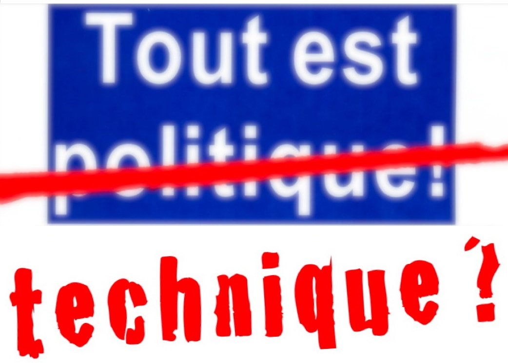 Logo de Technologos